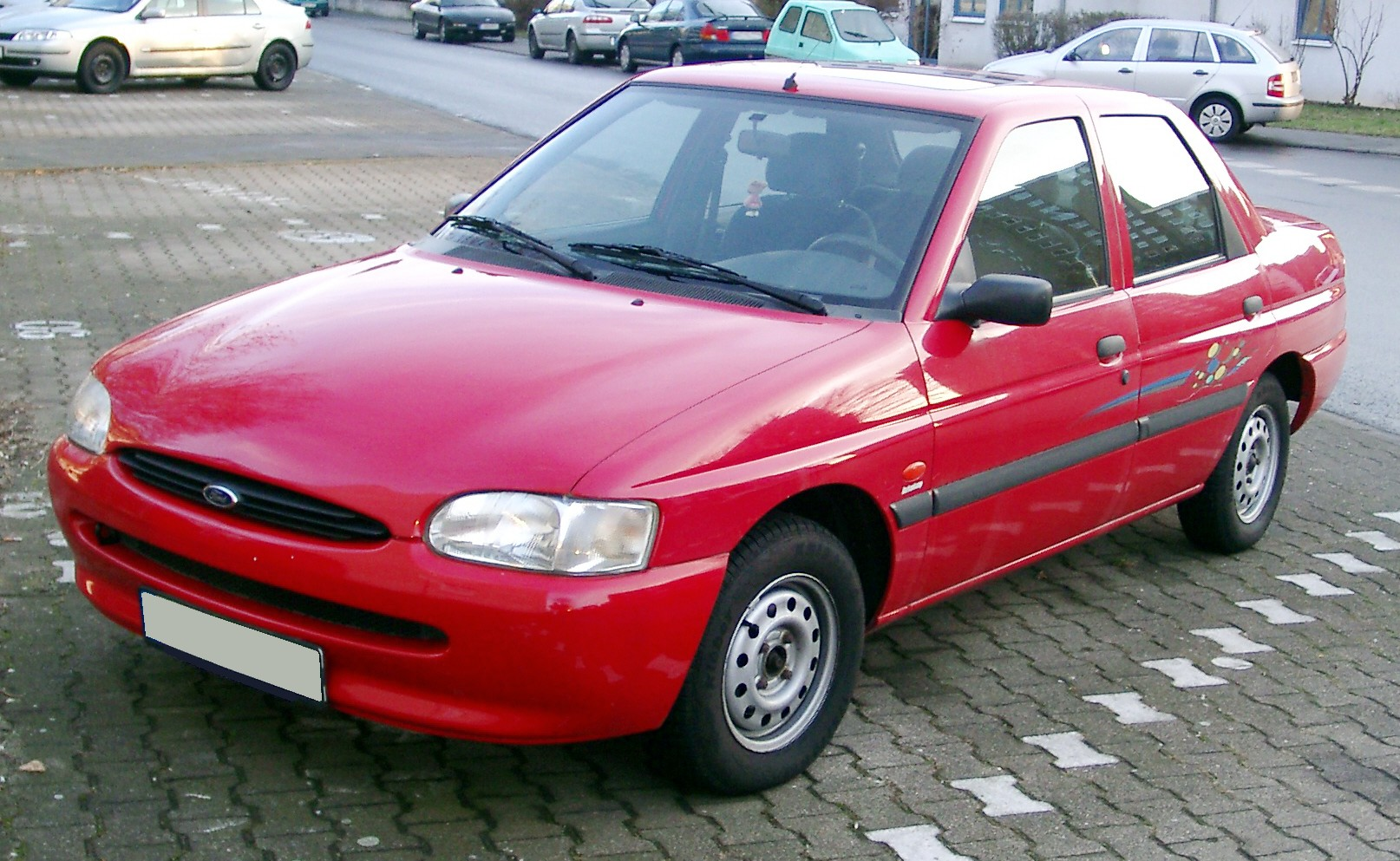 Ford Escort Mk7 Stufenheck